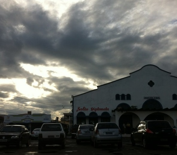 Vista o mercado ao fim da tarde.